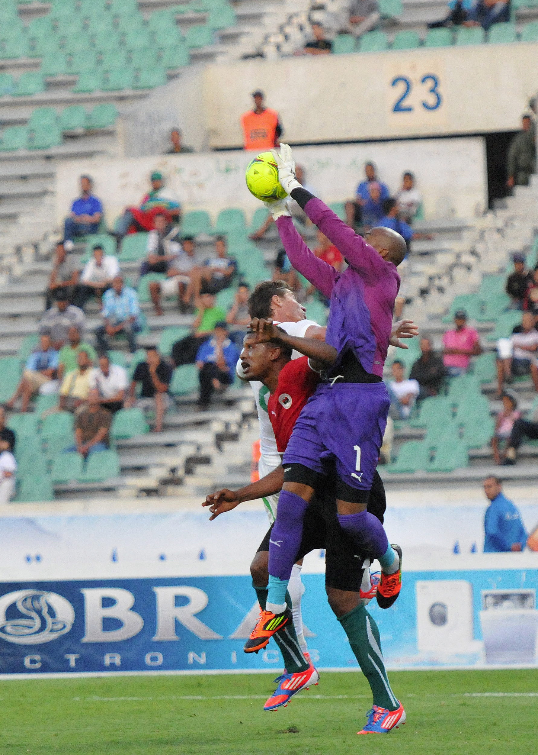 Match opposant la Libye à l'Algérie dans la ville de Casablanca au Maroc.